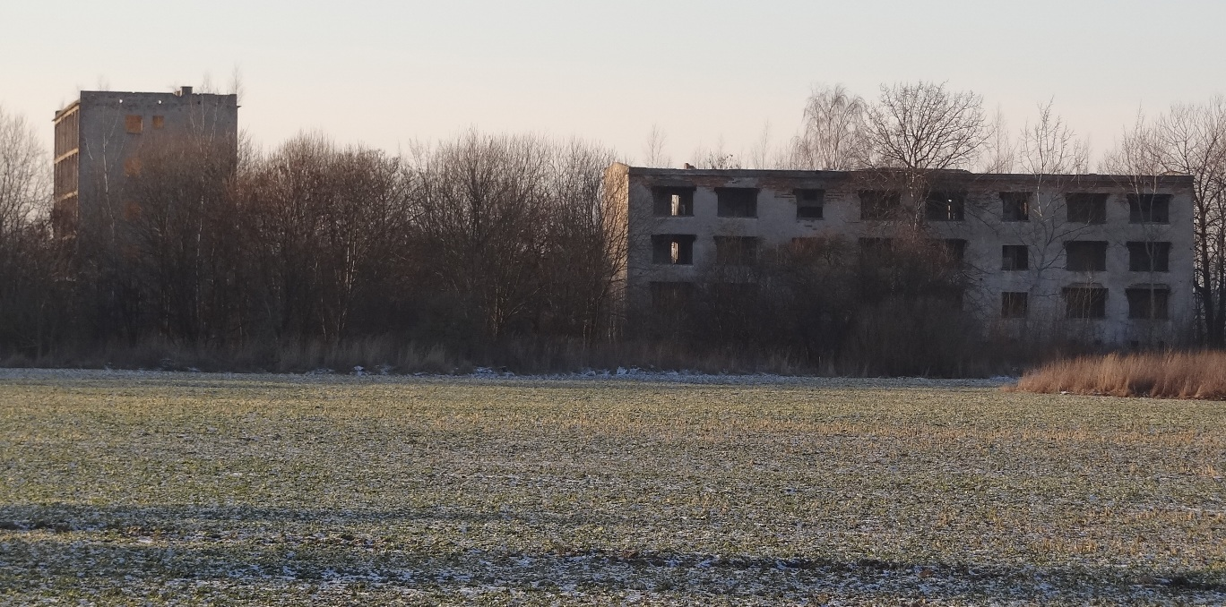 Zdewastowane poradzieckie budynki mieszkalne w byłej wiosce Słotnicy garnizonu Kluczewo, 2016r.